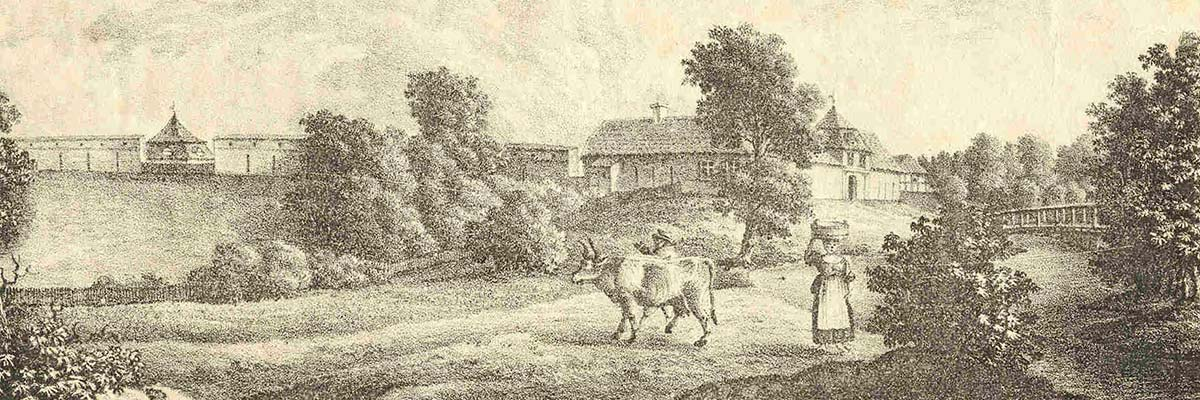 Šlokenbeka vasallilinnuse edelanurk, mõisaaegne lõunavärav ja laskeavadega läänemüür. Esiplaanil on näha ka linnusevalli.